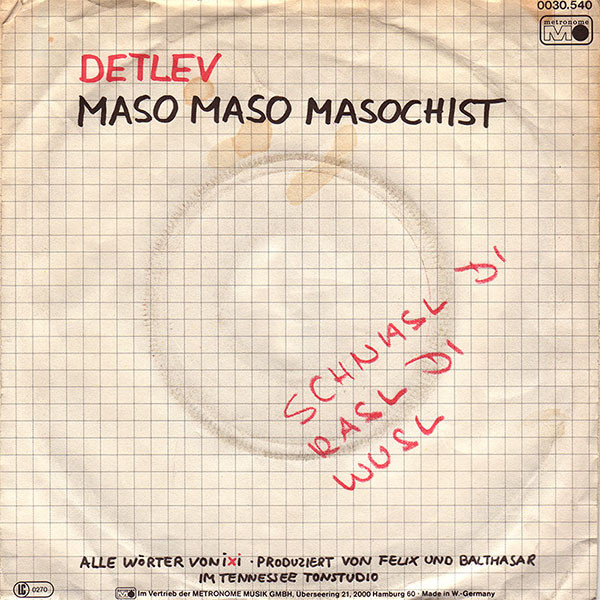 Backcover der Single Detlev von Ixi